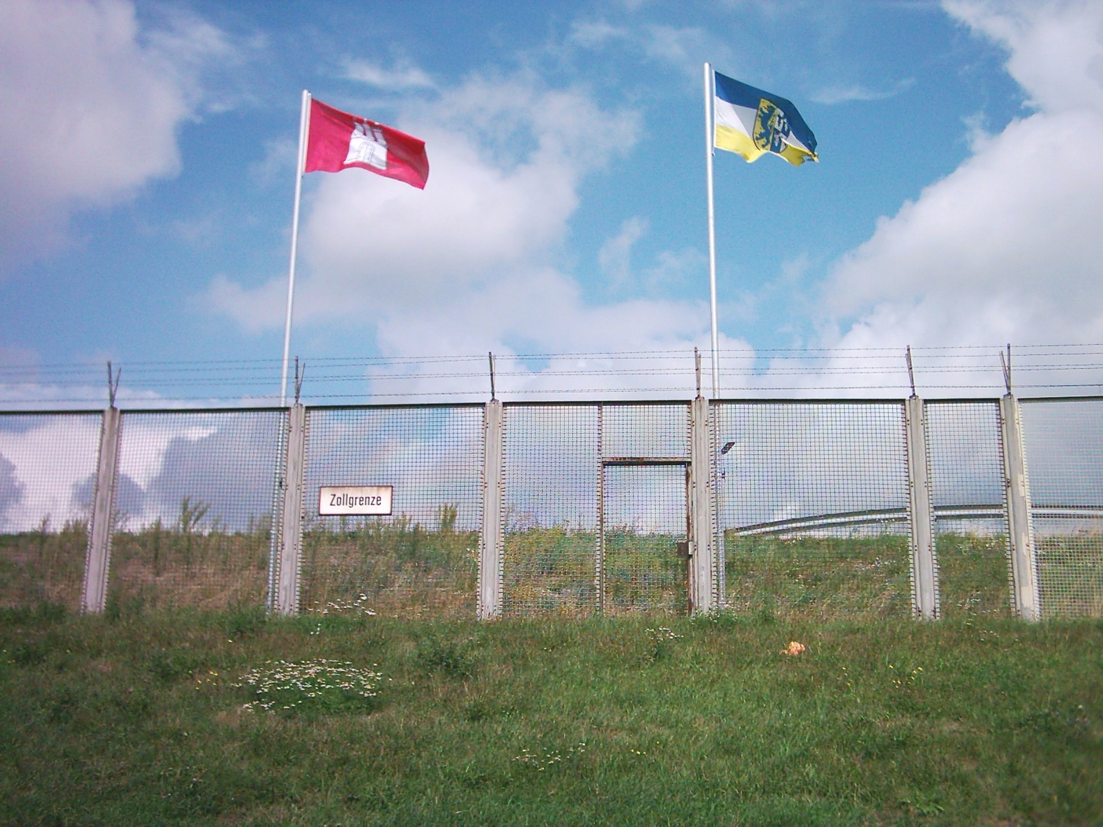 Die Zollgrenze in Hamburg-Kleiner Grasbrook. Links die Flagge von Hamburg, rechts die Flagge von Wilhelmsburg.